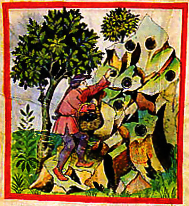 Cueillette de la truffe noire au XIVe siècle, illustration du Tacuinum sanitatis